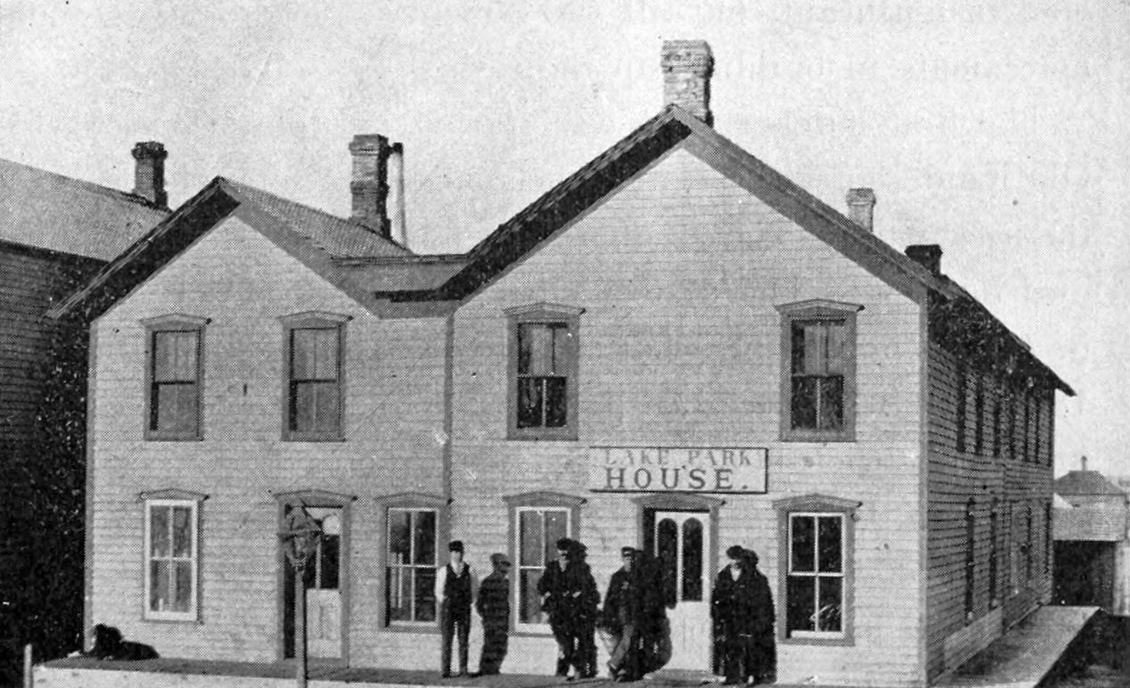 Pioneer Hotel in Lake Park, Iowa